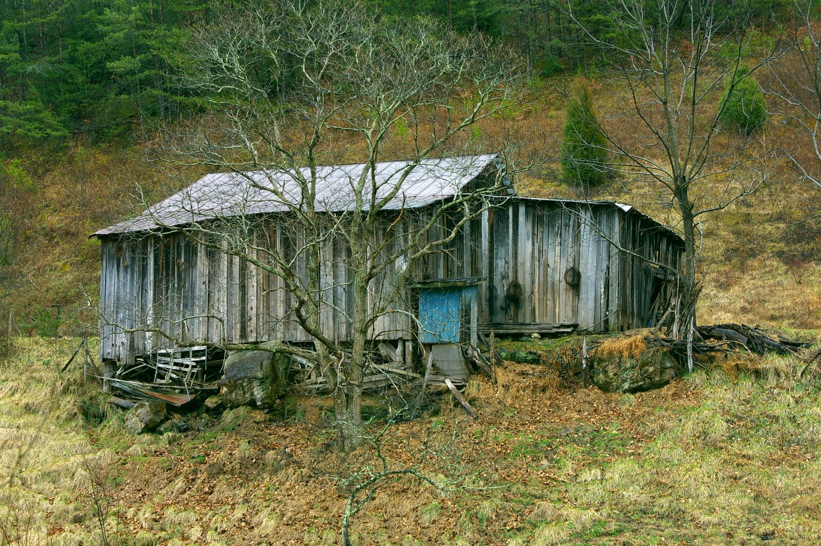 Shack in Pigeon Forge, Tennessee USA